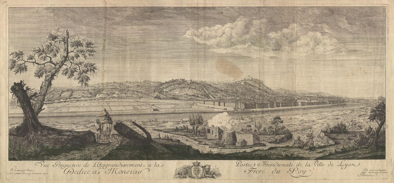 Vue en perspective du projet d'aménagement du sud de la Presqu’île, dessiné par Michel Perrache en 1770